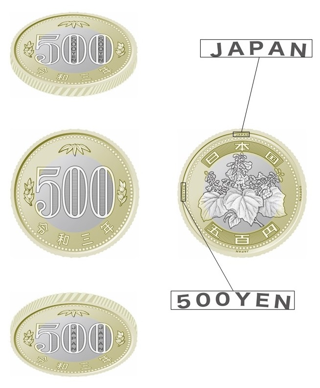 2021年発行予定の500円硬貨